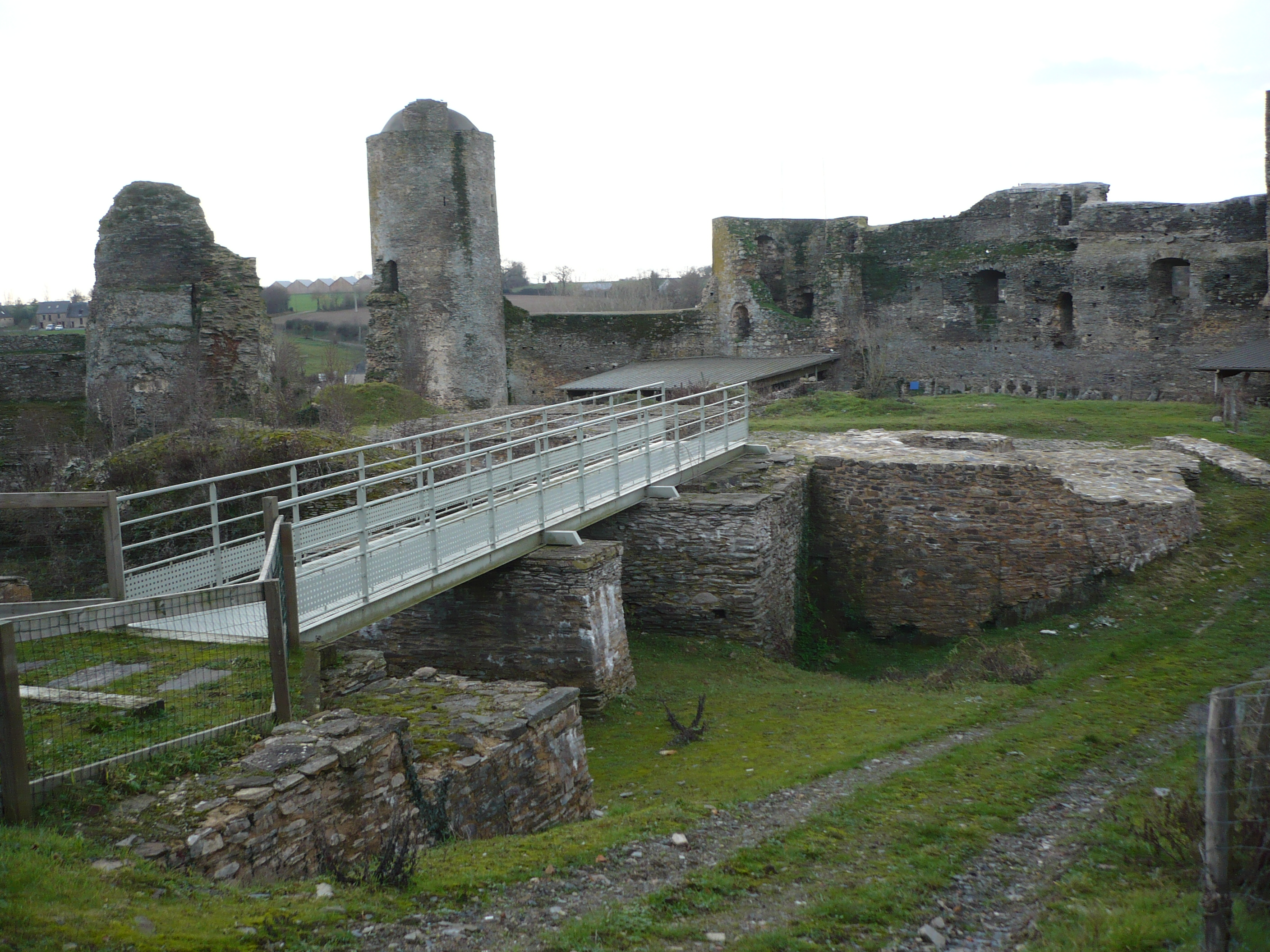 Piles, passerelle et châtelet d'entré du château de Pouancé